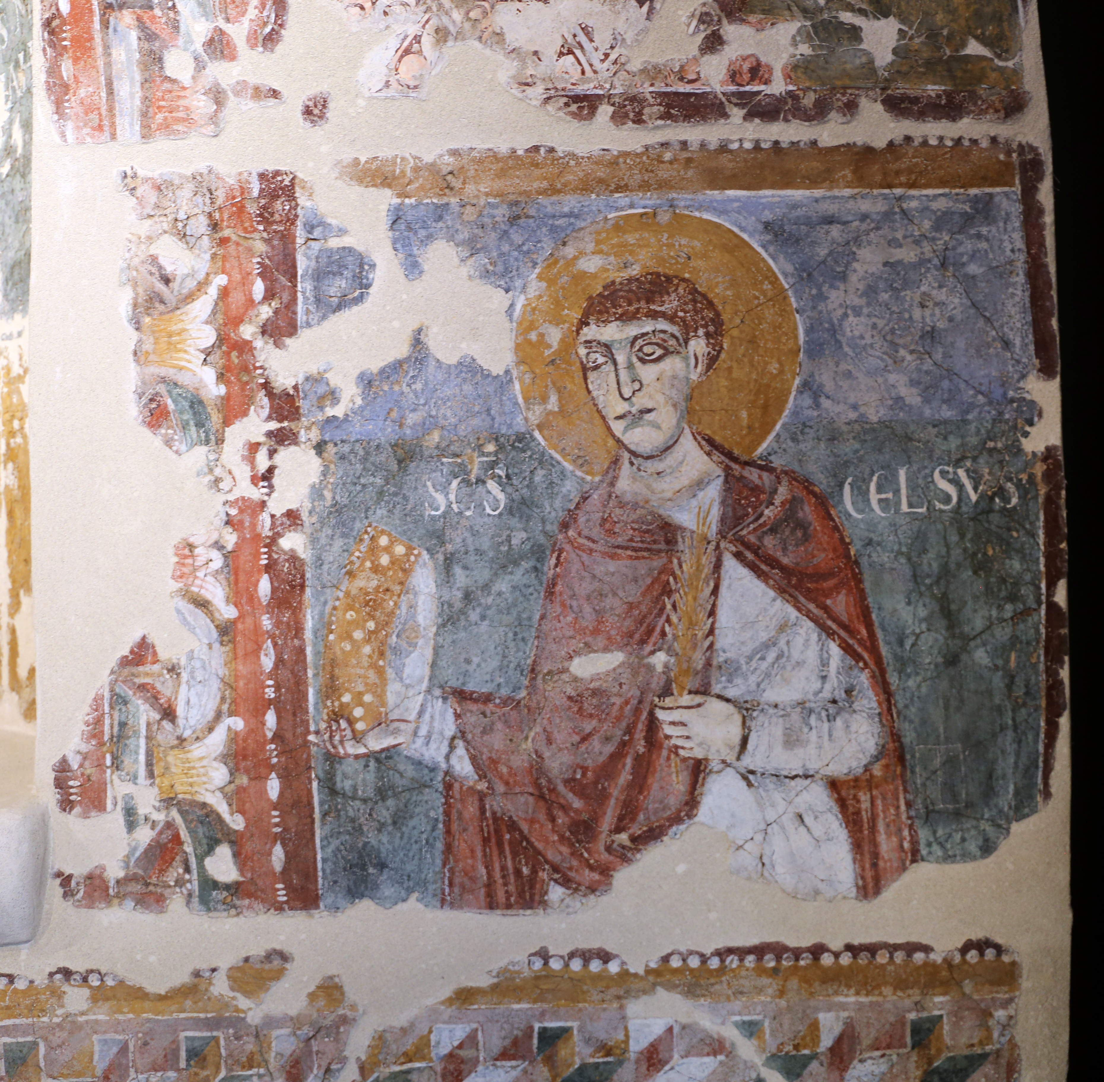 Museo degli affreschi Giovanni Battista Cavalcaselle This is a photo of a monument which is part of cultural heritage of Italy.